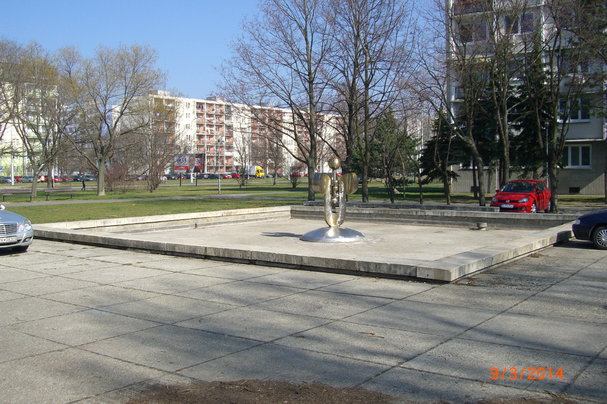 Fontana Maria, Bratislava/Ruzinov/Posen